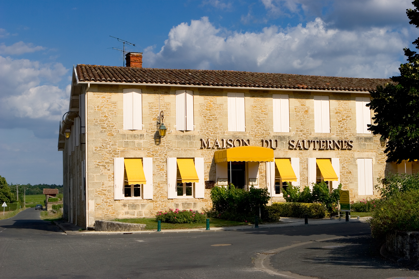 Village et vignoble, Sauternes, France.